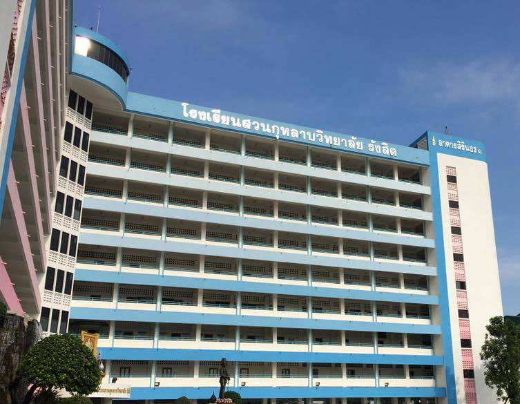 อาคารสิรินธร 1 โรงเรียนสวนกุหลาบวิทยาลัย รังสิต